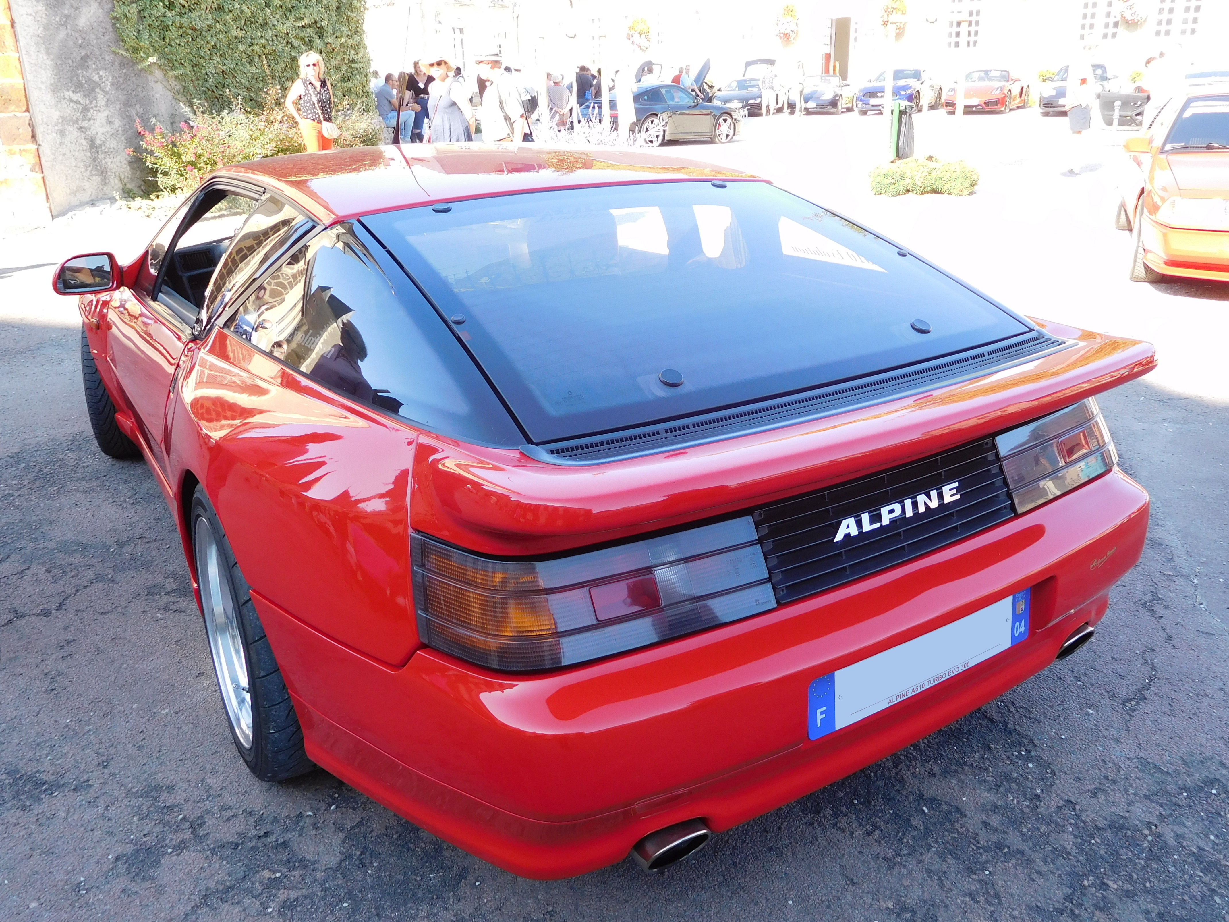 Alpine A610 Evolution de 1992, moteur 3 L de 300 ch, 12 CV, consommation 9 L/100 km ; exposition de véhicules, Aubigny-sur-Nère, Cher, France.